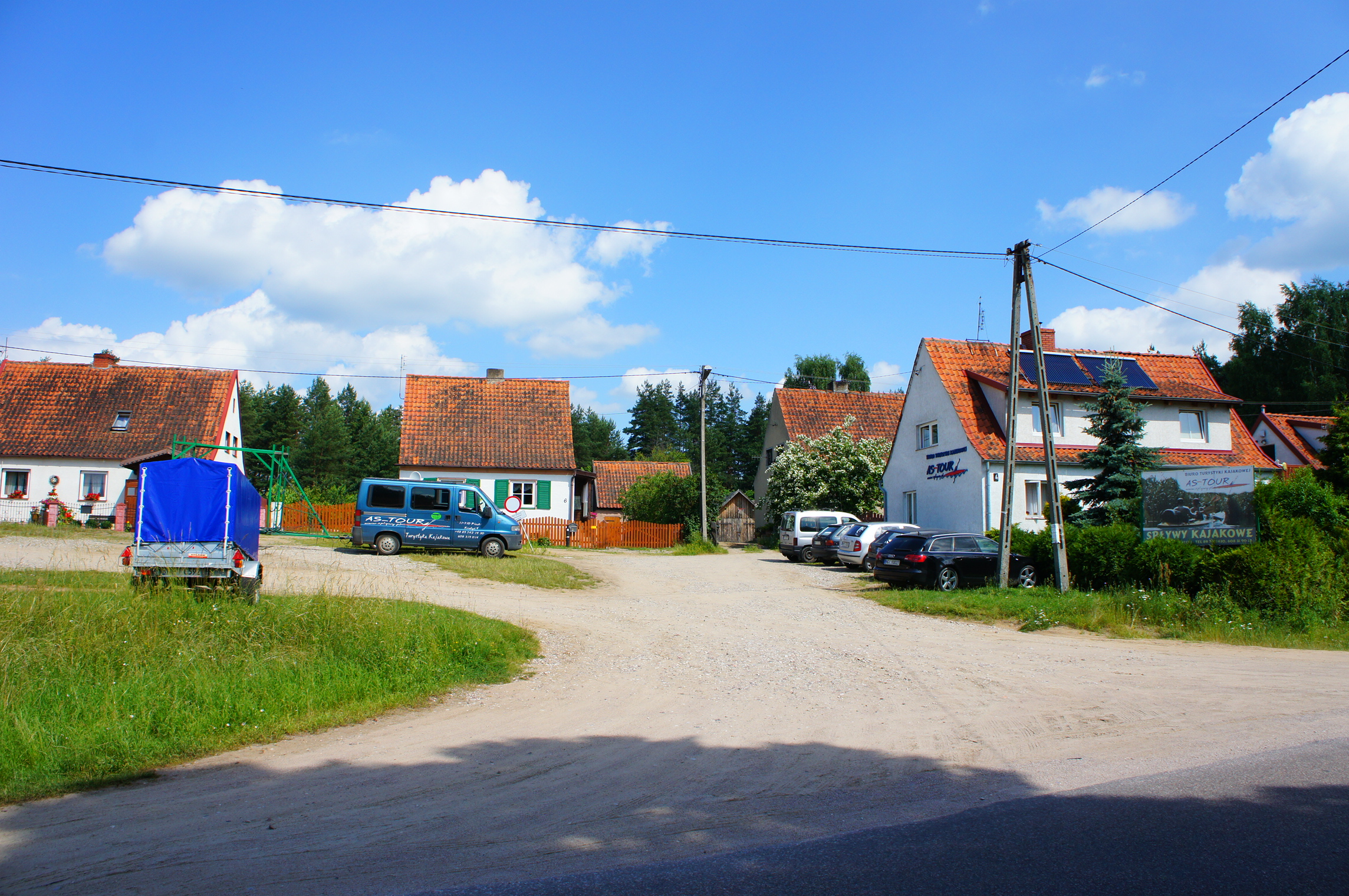 Krutyń - spływ kajakowy AS-tour - parking